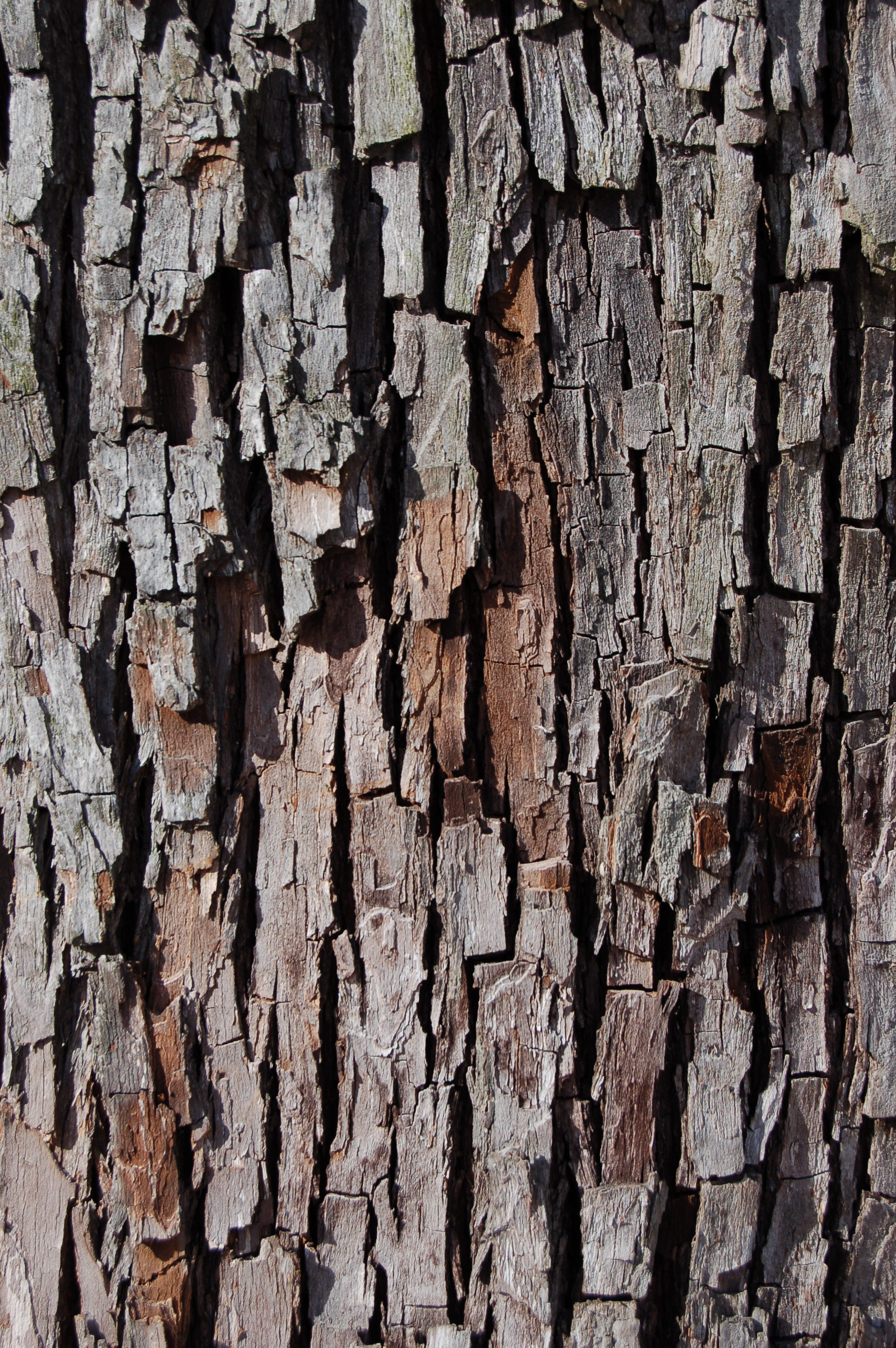 Speierling Sorbus domestica, Rinde